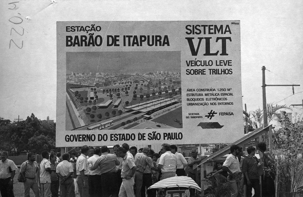 Placa exibida no canteiro de obras da estação Barão de Itapura do VLT de Campinas